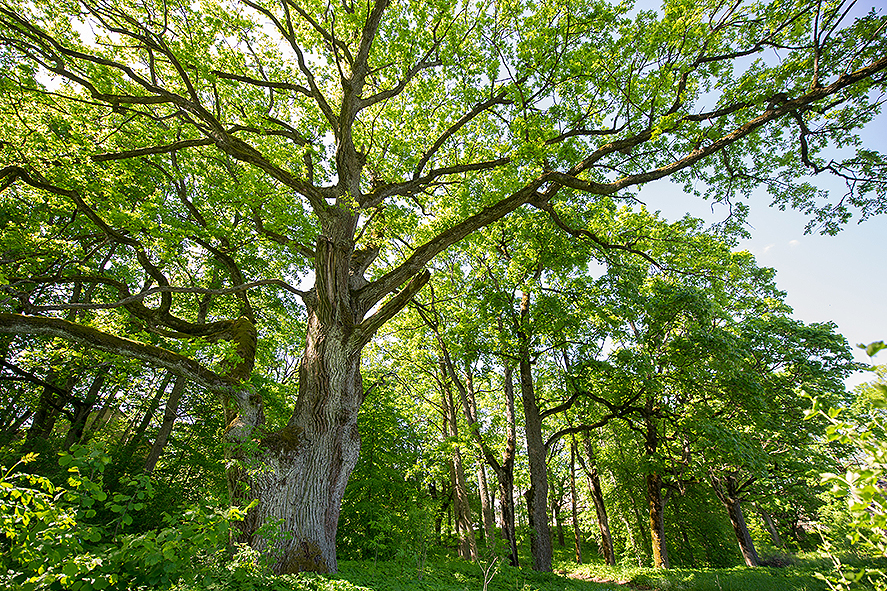 Ilzenbergo dvaro Ąžuolas. Kamieno apimtis 1.3 metro aukštyje- daugiau kaip 5-ki metrai.